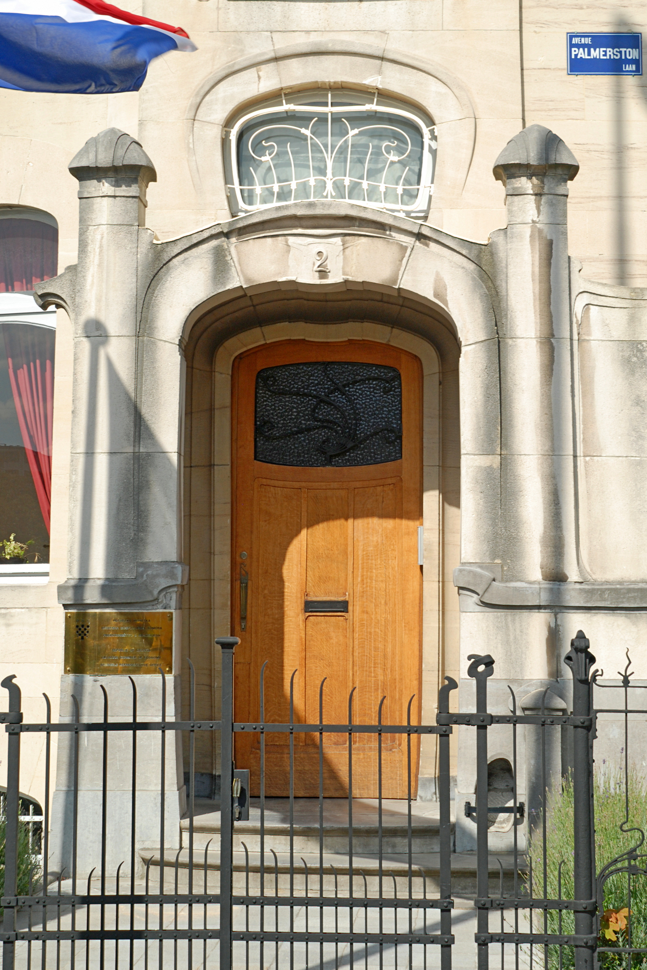 Belgique - Bruxelles - Hôtel Van Eetvelde (Art nouveau - Victor Horta - 1895)